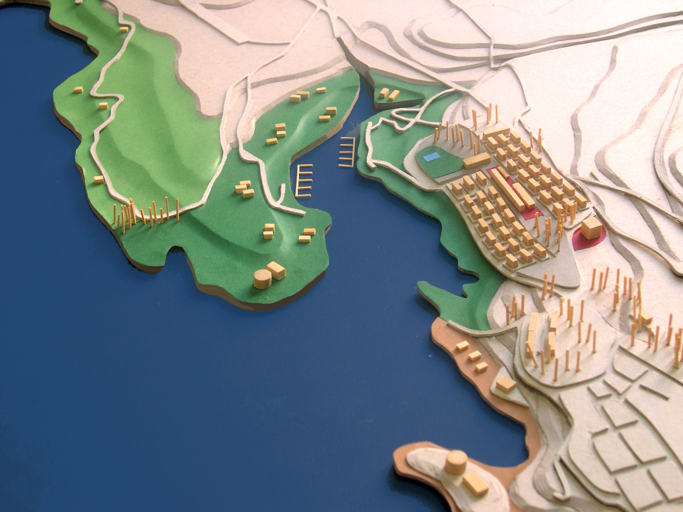 Plano urbano de integración de la ciudad y el lago. Villa El Chocón.